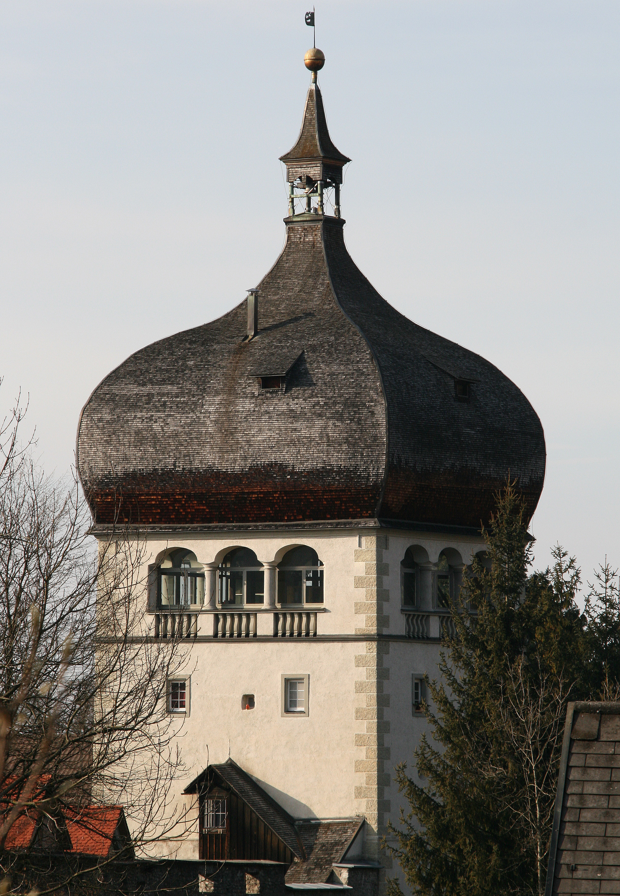 Der Martinsturm, ehemals Getreidespeicher in Bregenz, erbaut 1600. Heute Vorarlberger Militärmuseum. Veröffentlicht: Georg Kessler in "Freizeit im Ländle, Die schönsten Ausflugziele in Vorarlberg ISBN 978-3-7022-3068-5 2010